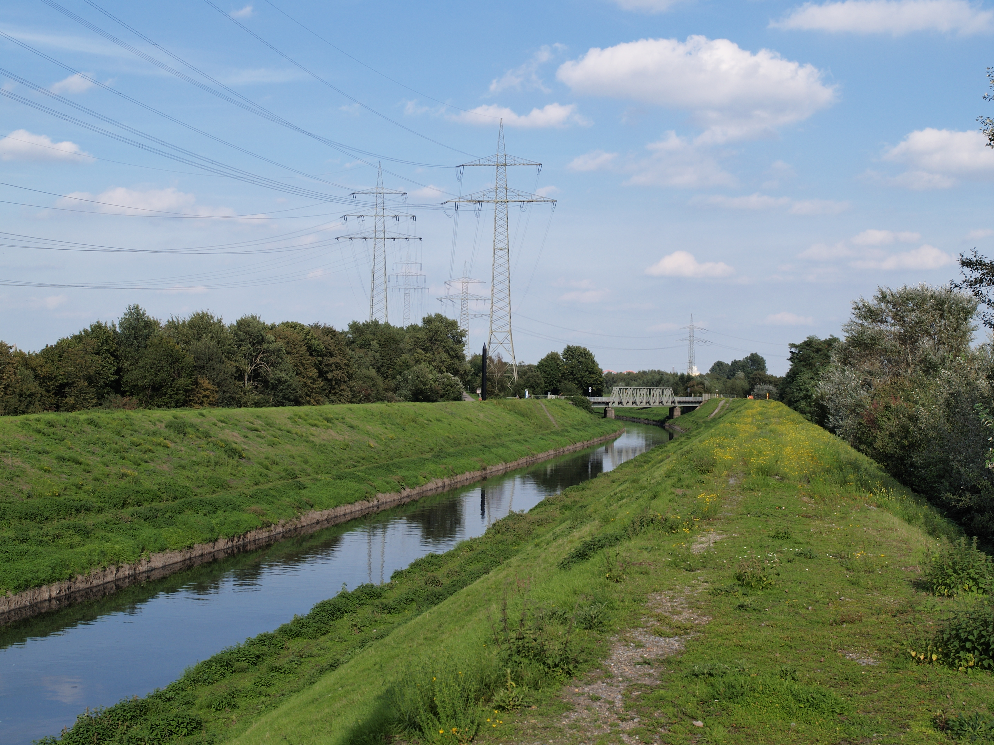 Carbon Obelisk ein aus Carbonfasern bestehender hohler Obelisk von Rita McBride, errichtet auf der Emscherinsel in Essen anlässlich der Emscherkunst.2010